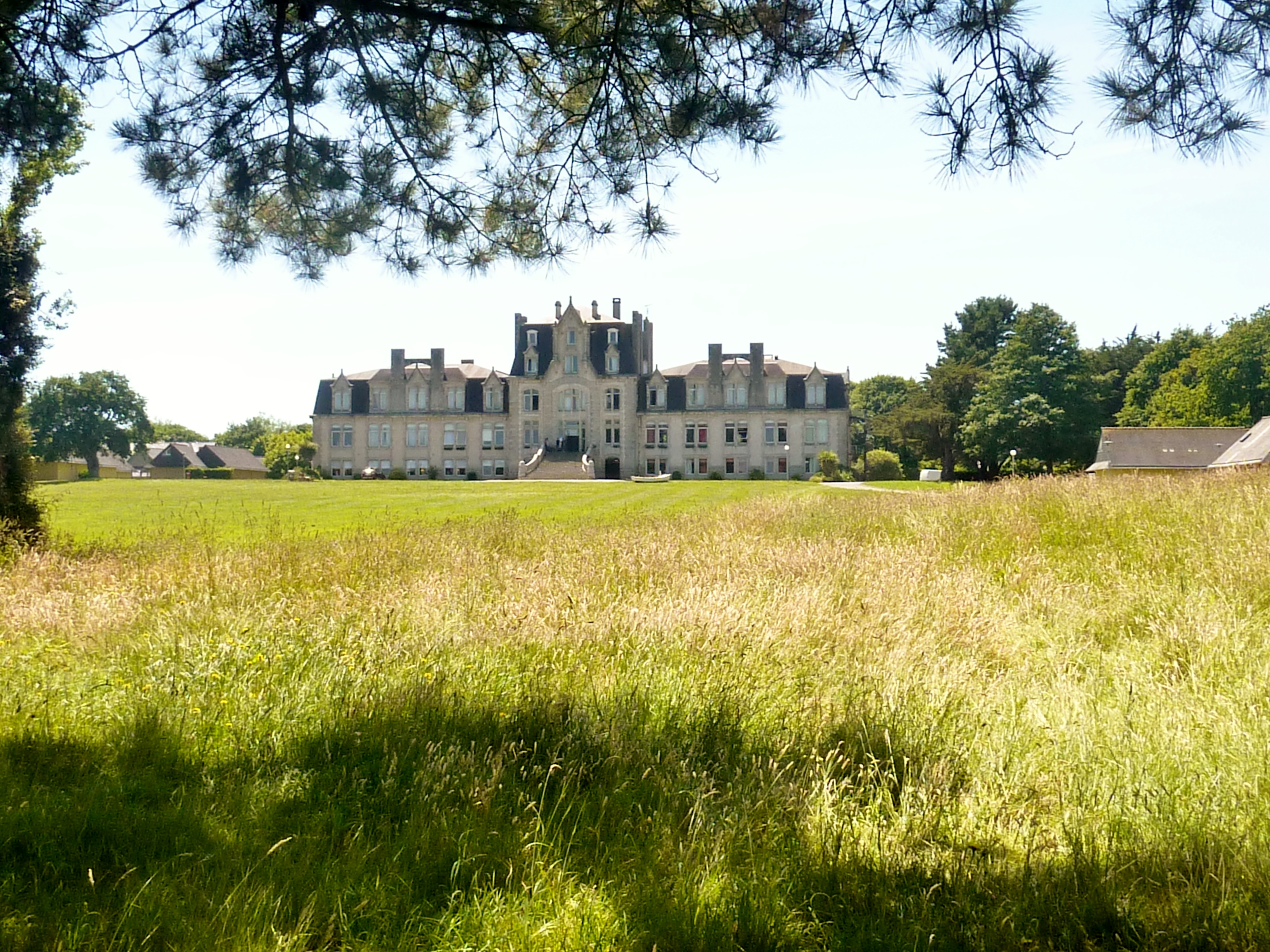 La Rivière de Pont-l'Abbé : le centre de vacances du Dourdy (commune de Loctudy).